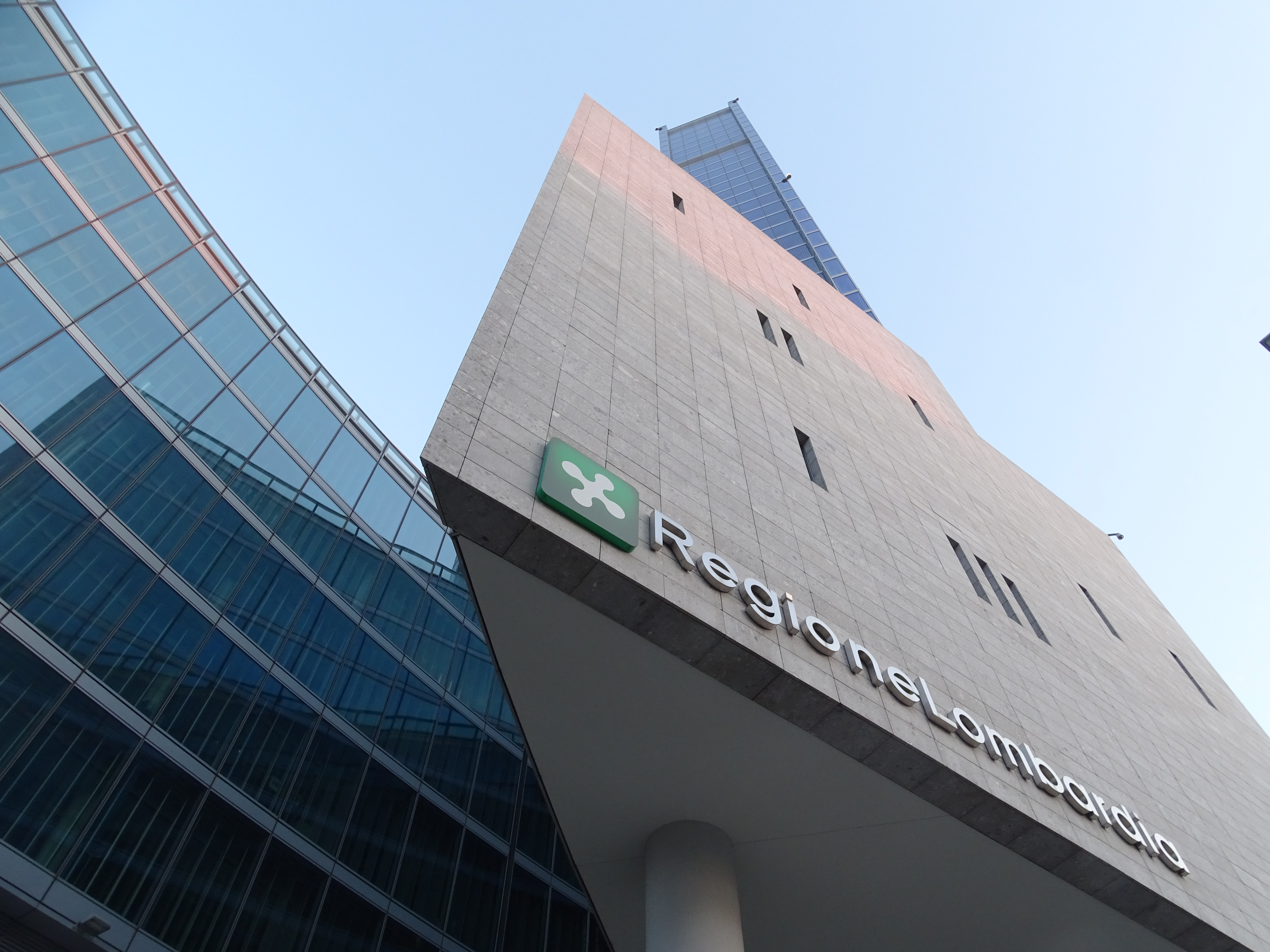 Regione lombardia grattacielo